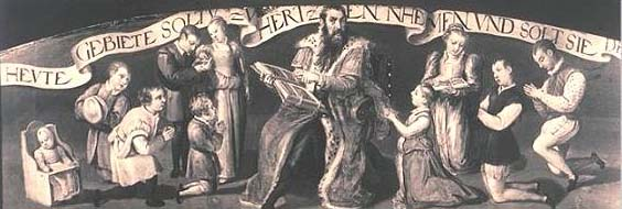 king unknown